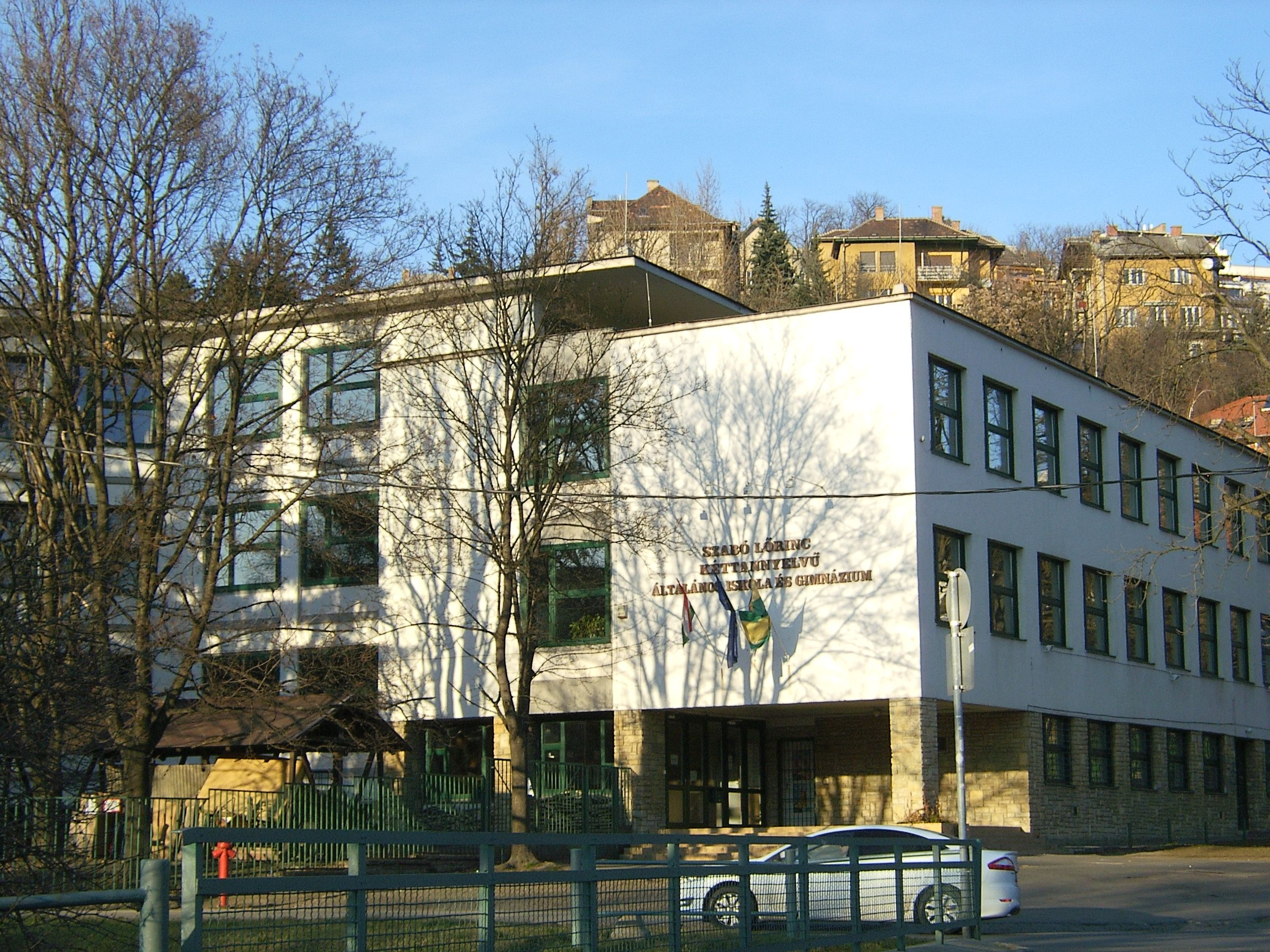 Szabó Lőrinc Általános Iskola és Gimnázium, - Pasaréti út 191-193.